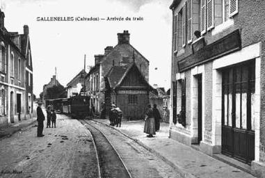 Arrivée du train du Calvados à Sallenelles